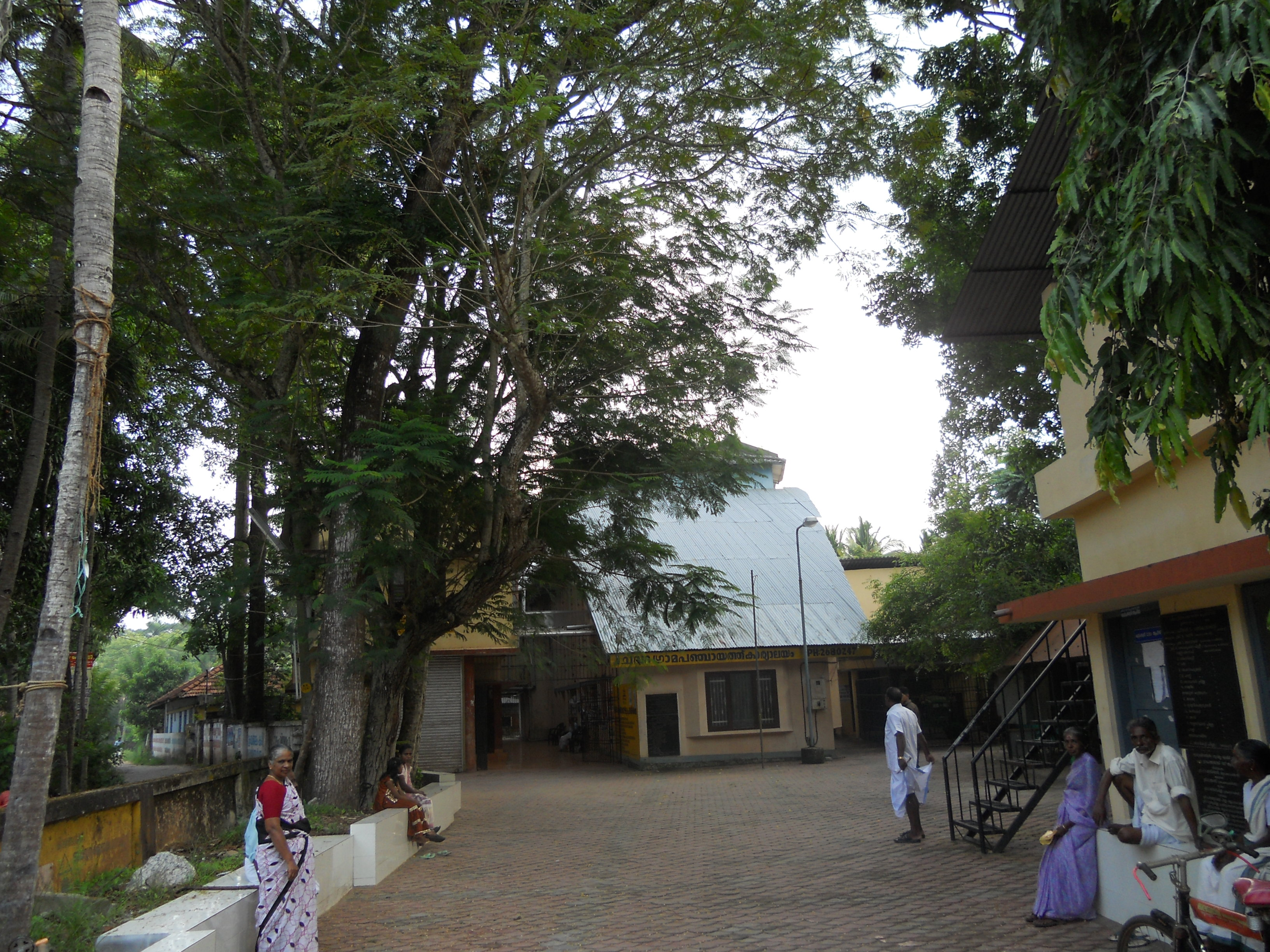 ചവറ ഗ്രാമപഞ്ചായത്ത് ഓഫീസ്